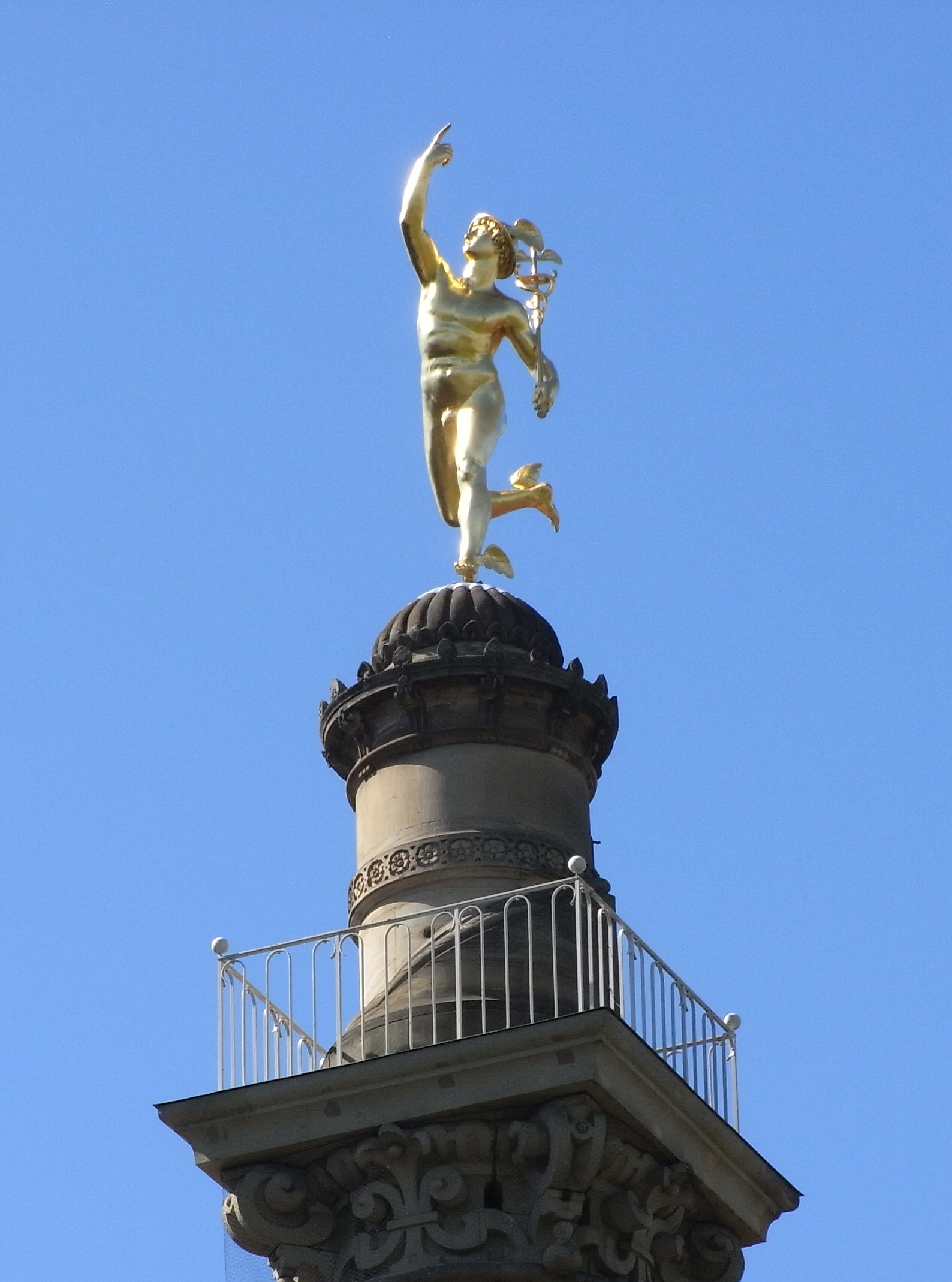 Merkursäule an der Nordwestecke der Alten Kanzlei in Stuttgart.